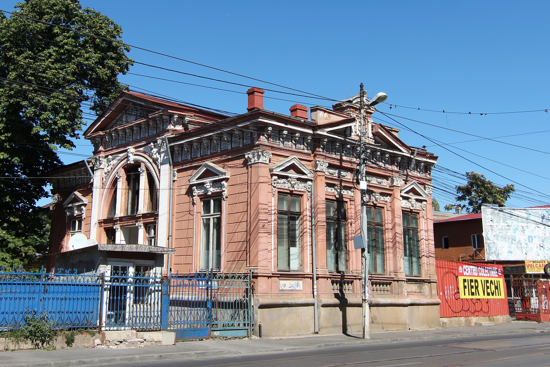 Casă pe Calea Călărașilor